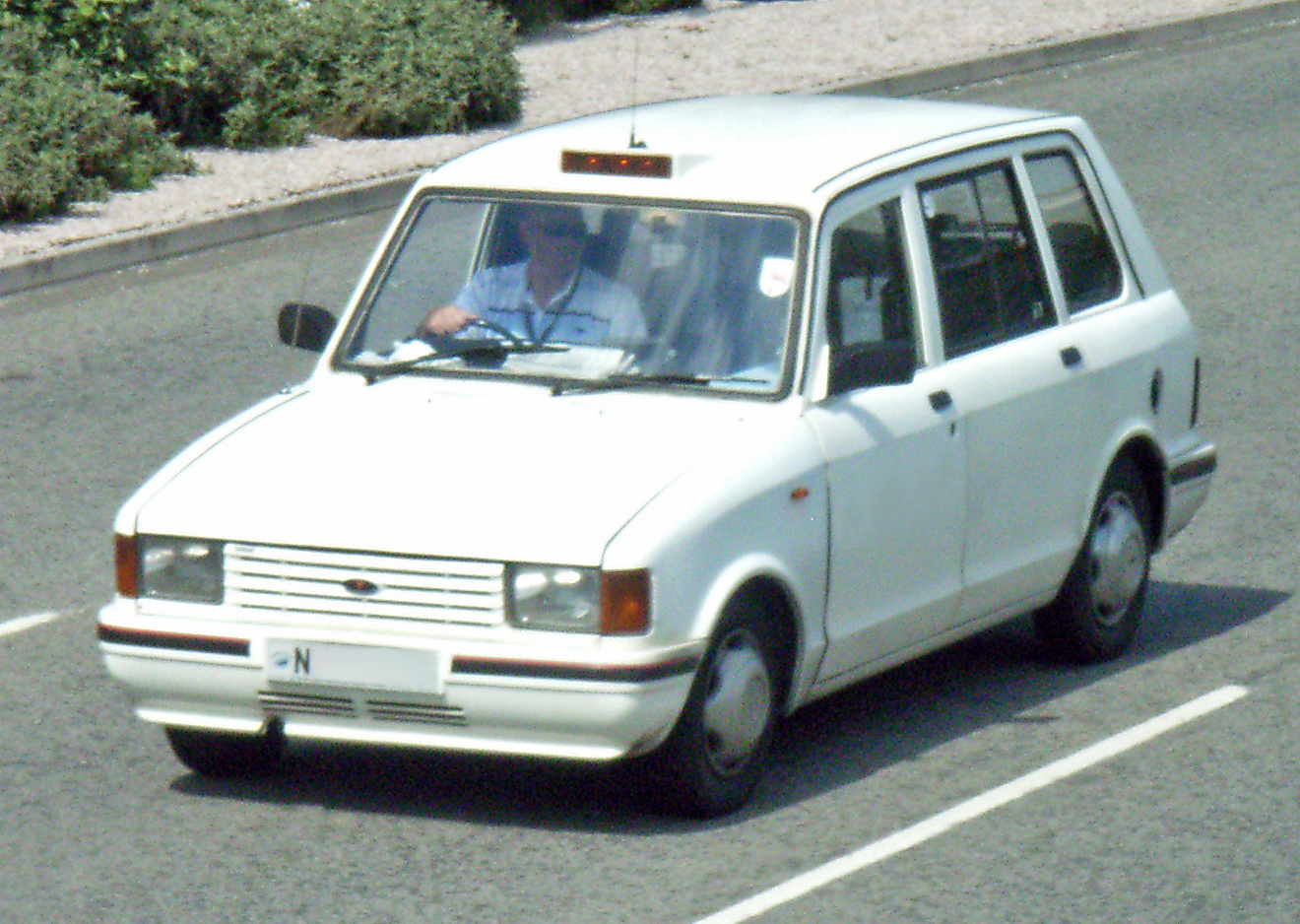 2.5 litre diesel Metrocab II (1997)